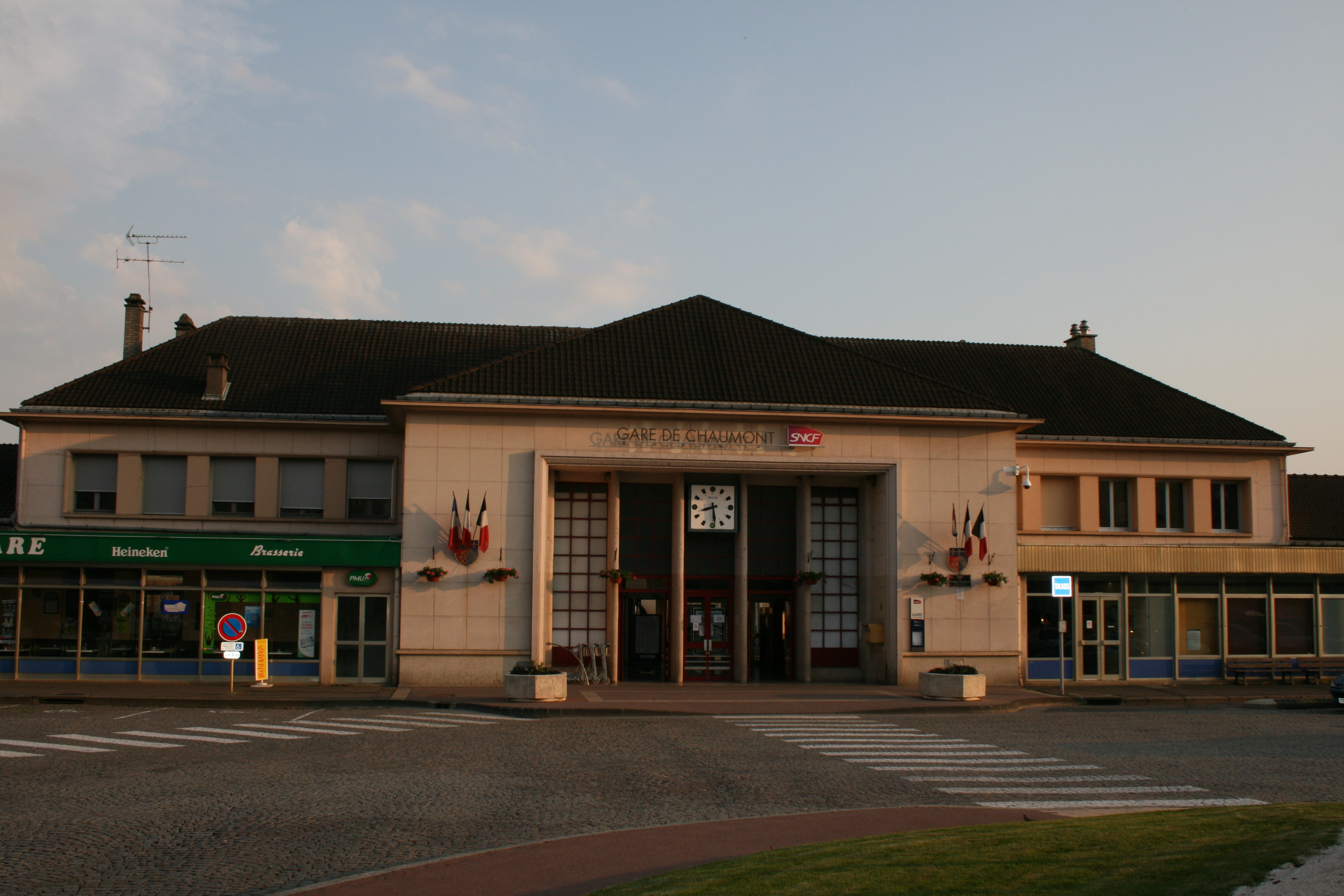 Gare de Chaumont ( Haute-Marne )52000